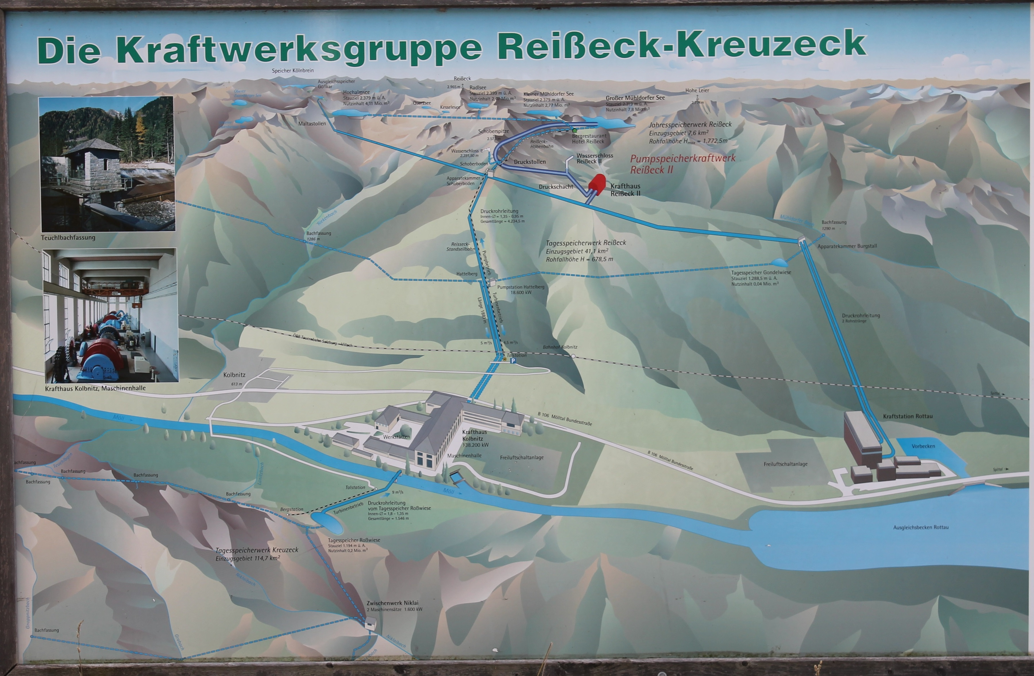 Eine Schautafel mit einer Übersicht der Kraftwerksgruppe Reißeck-Kreuzeck in Kolbnitz, Kärnten, Österreich.